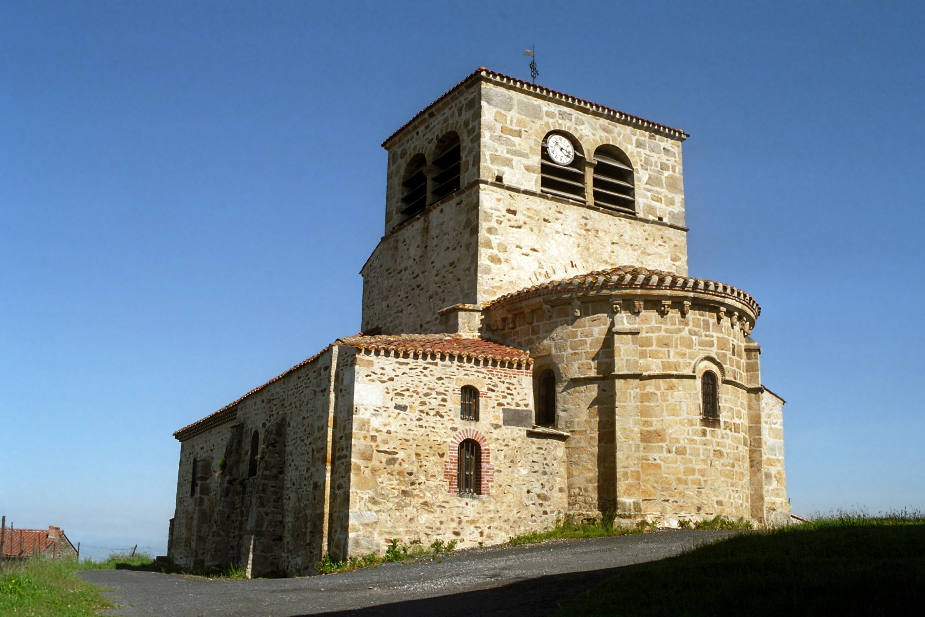 France - Auvergne - Velay - Église de Saint-Hilaire